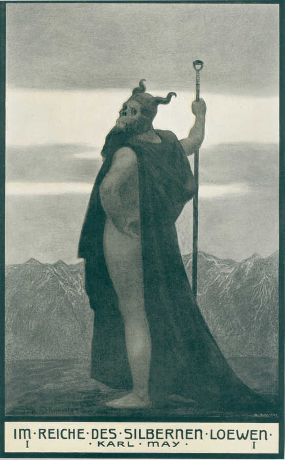 Deckelbild zu Karl Mays Reiseerzählung Im Reiche des silbernen Löwen I (Sascha-Schneider-Ausgabe)